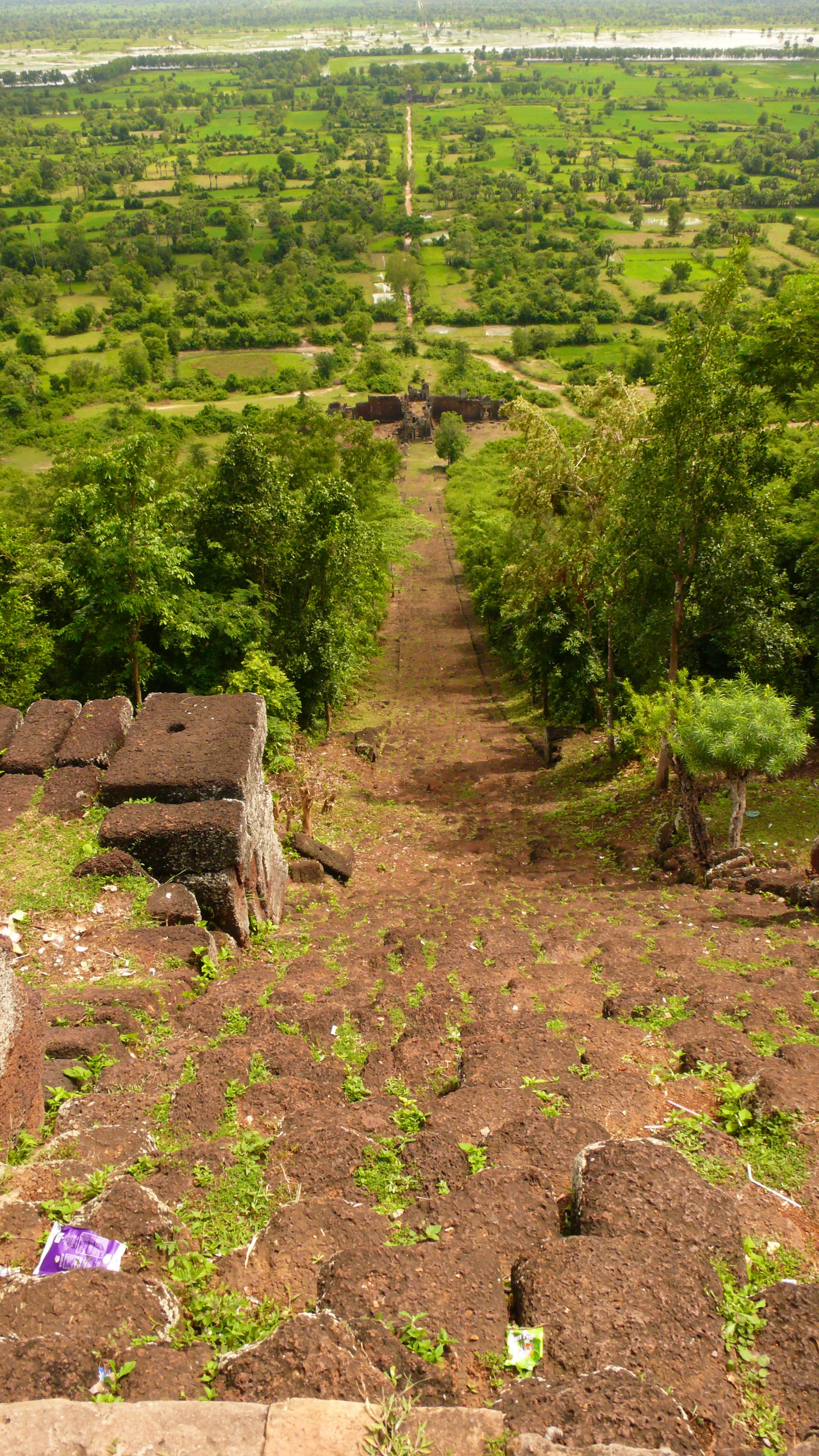 L1030498